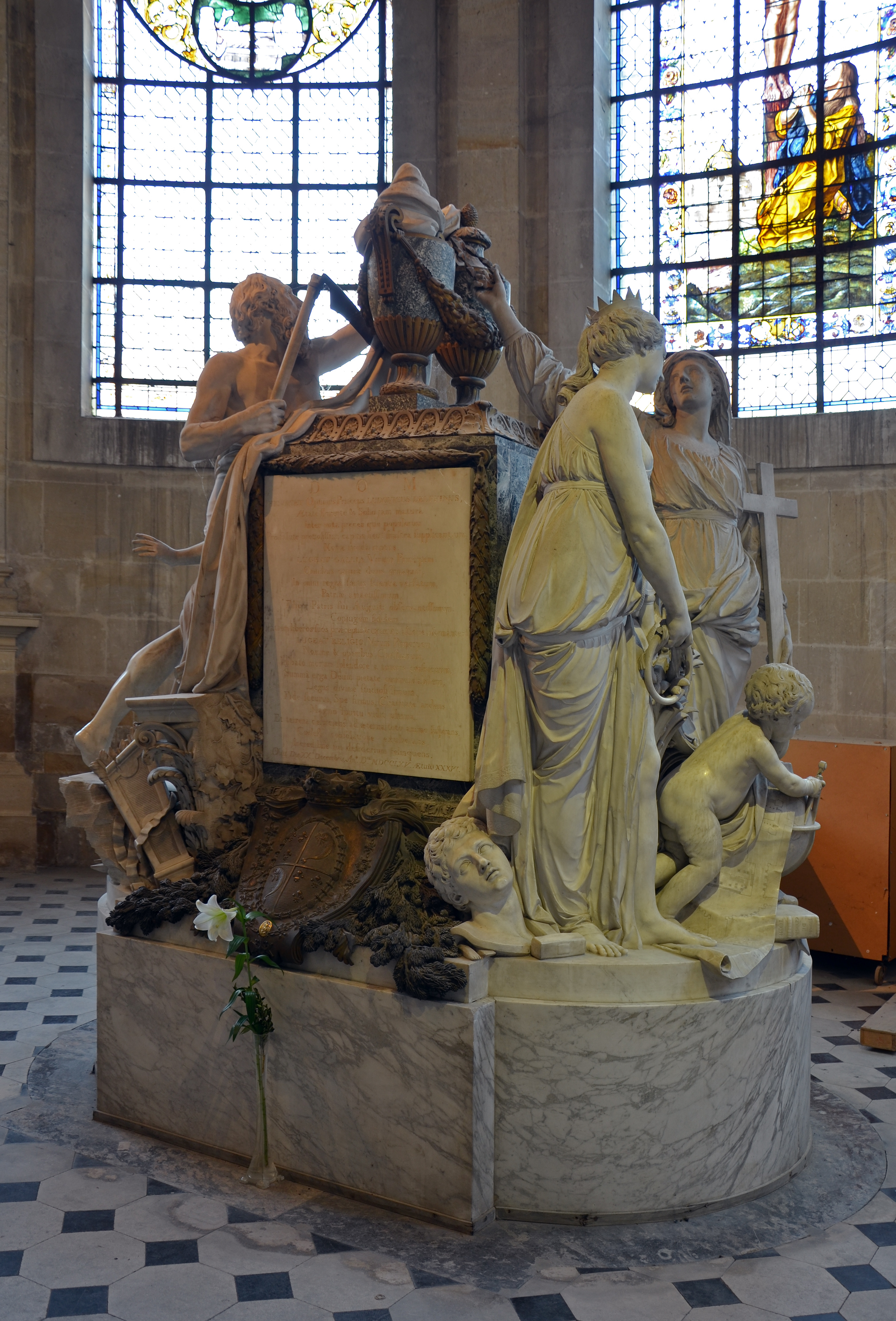 Cénotaphe du grand Dauphin par Guillaume Coustou situé dans la cathedrale de Sens, Yonne, Bourgogne,France